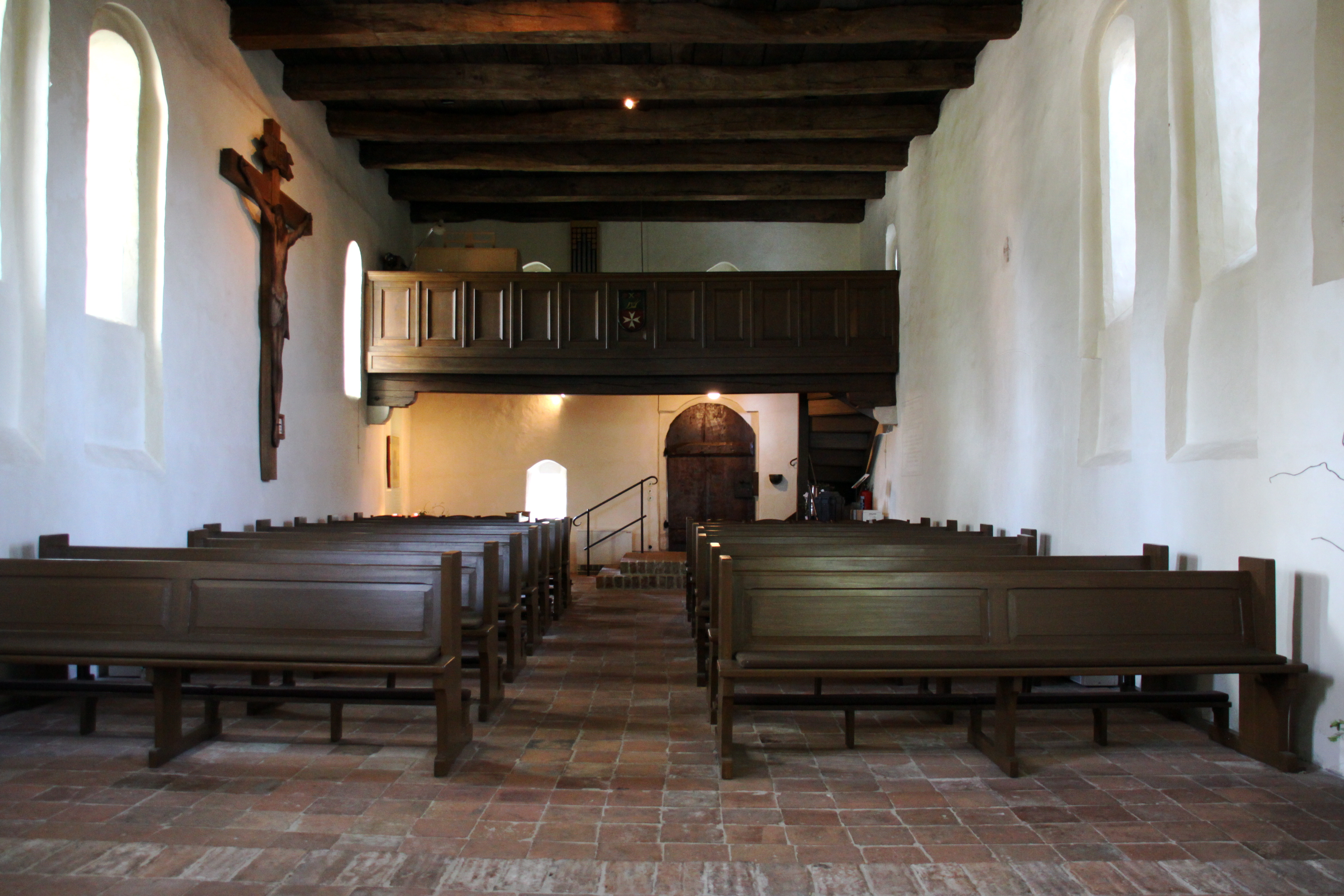 Blick in die Johanniterkapelle Bokelesch